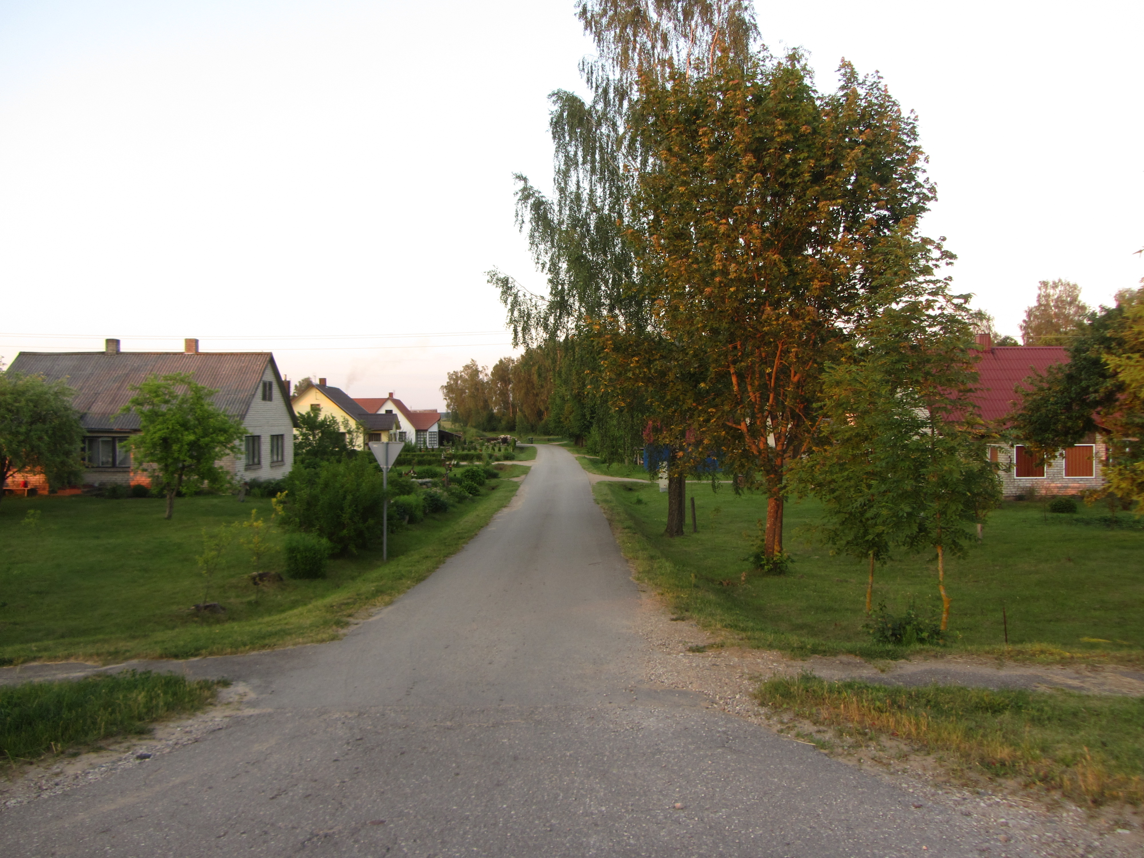 Mikalavas 64484, Lithuania